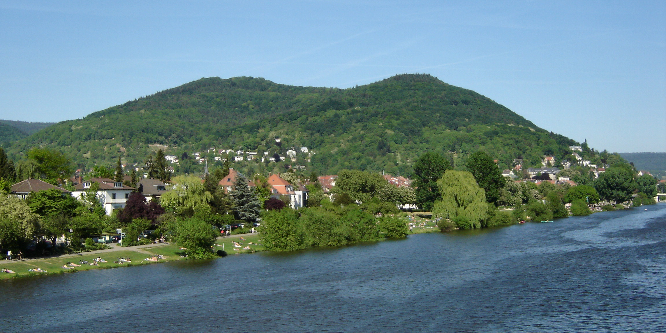 Der Heidelberger Heiligenberg links und rechts der Michaelsberg. Blick von der Ernst-Walz-Brücke nach Nordosten, im Vordergrund Neuenheim und der Neckar.